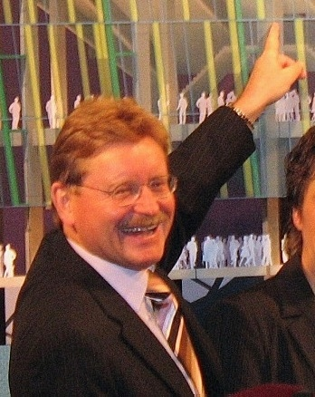 Mitglied des Bayerischen Landtags sowie Altoberbürgermeister Dr. Paul Wengert (Augsburg)